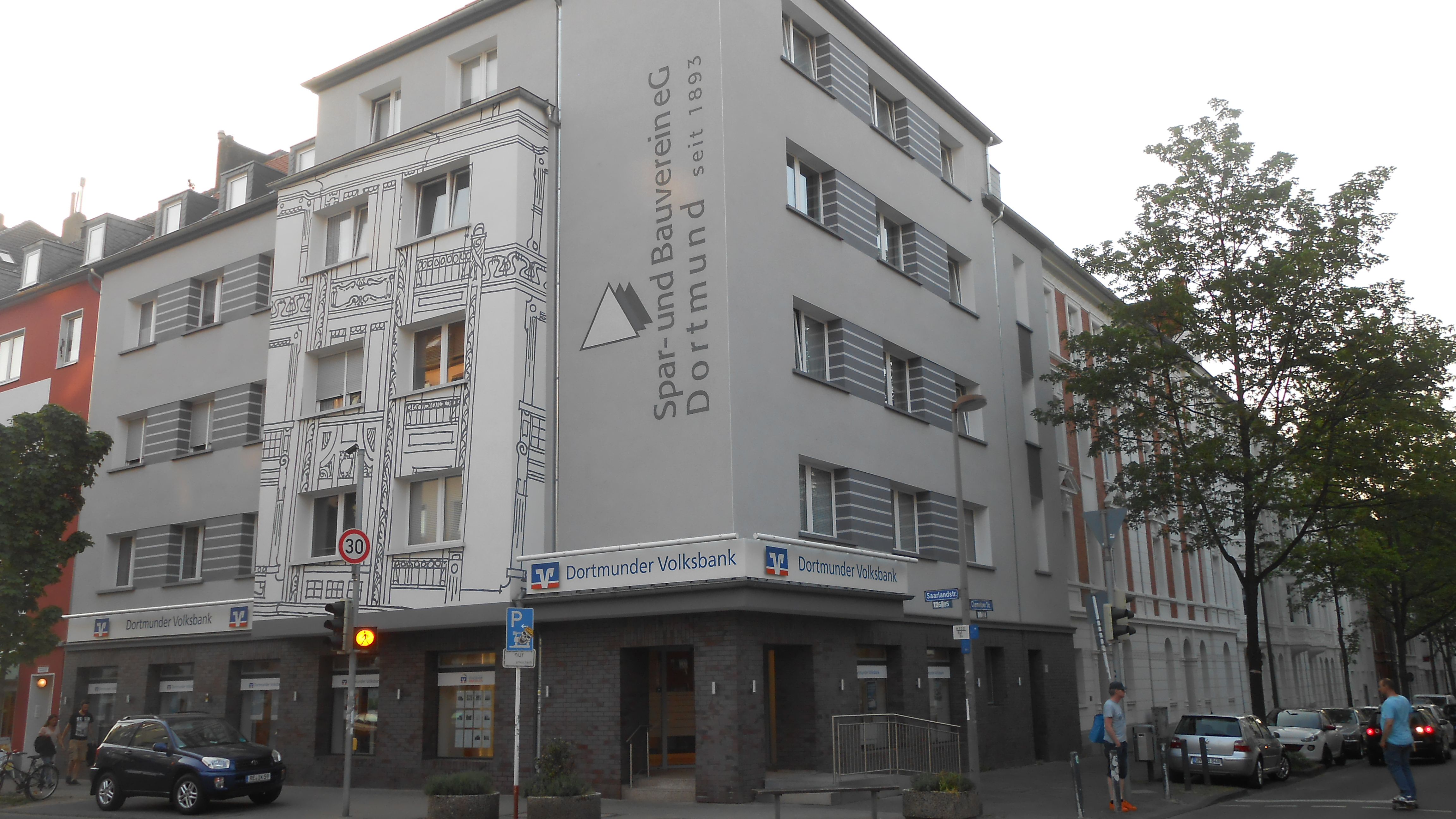 Haus des Spar- und Bauvereins mit Filiale der Dortmunder Volksbank an der Saarlandstraße in der südlichen Dortmunder Innenstadt.